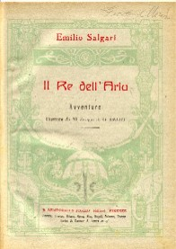 Copertina per il romanzo di Emilio Salgari Il re dell'aria (1907), edizione del 1921. Illustrazione di Alberto della Valle (1851-1928).